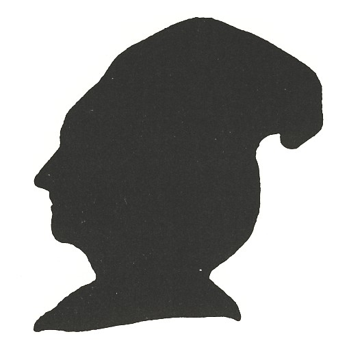 Schriftstellerin und Salondame Elise Reimarus